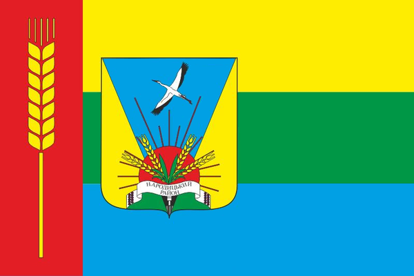 Прапор Народицького району